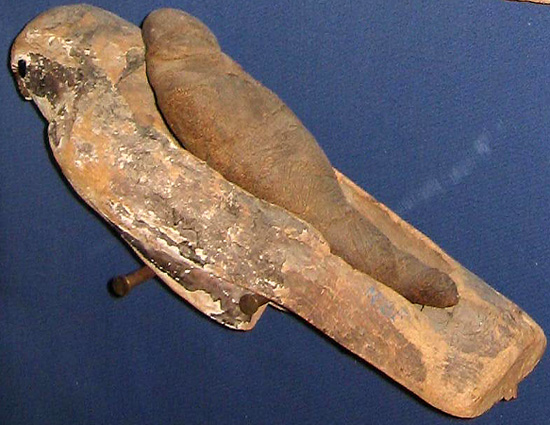 Мумия ястреба (Древний Египет)